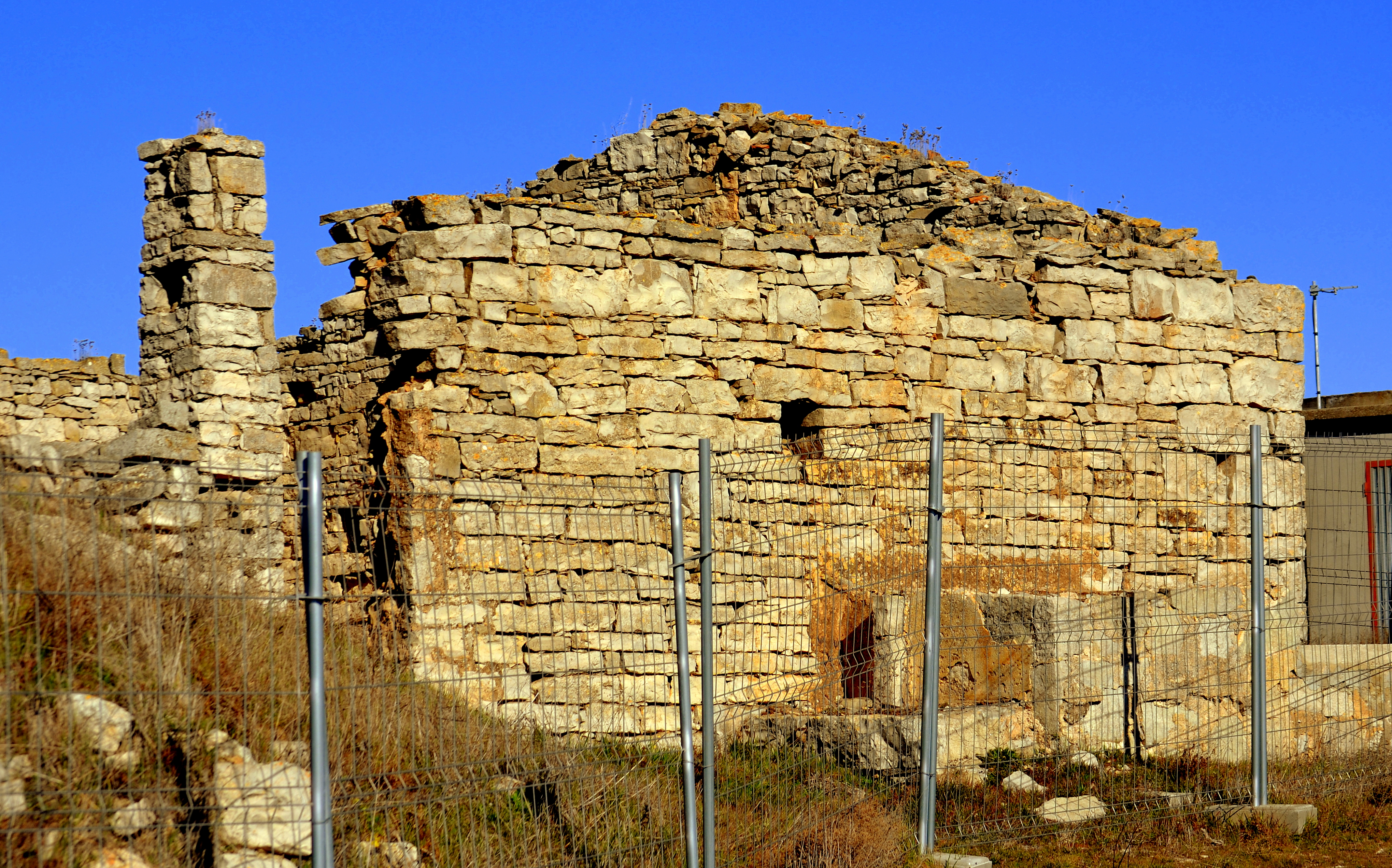 Castell d'Alta-riba (Estaràs)